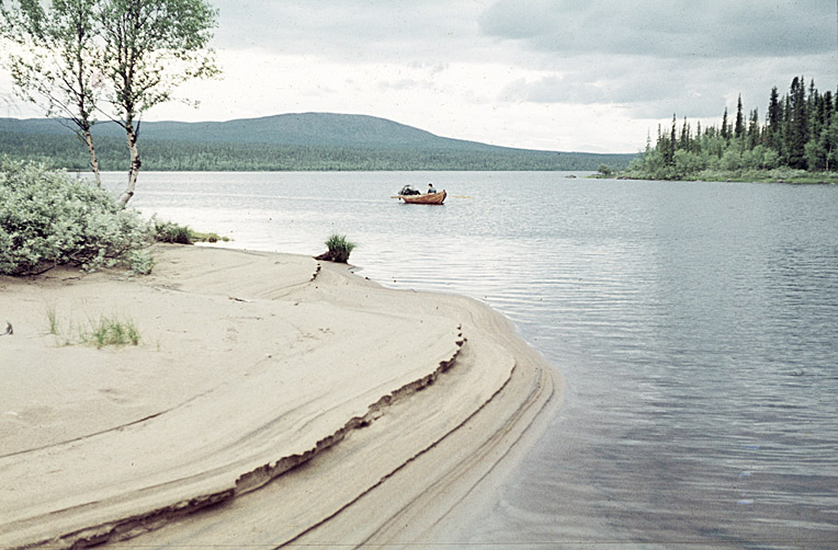 Vy vid Patatj. Laponia. Motiv: Satisjaure Nyckelord: Världsarv Kategori: Insjömiljöer Vy vid Patatj. Laponia.